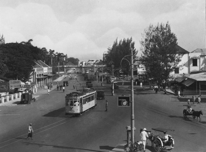 Foto. Aloon-aloon in Soerabaja